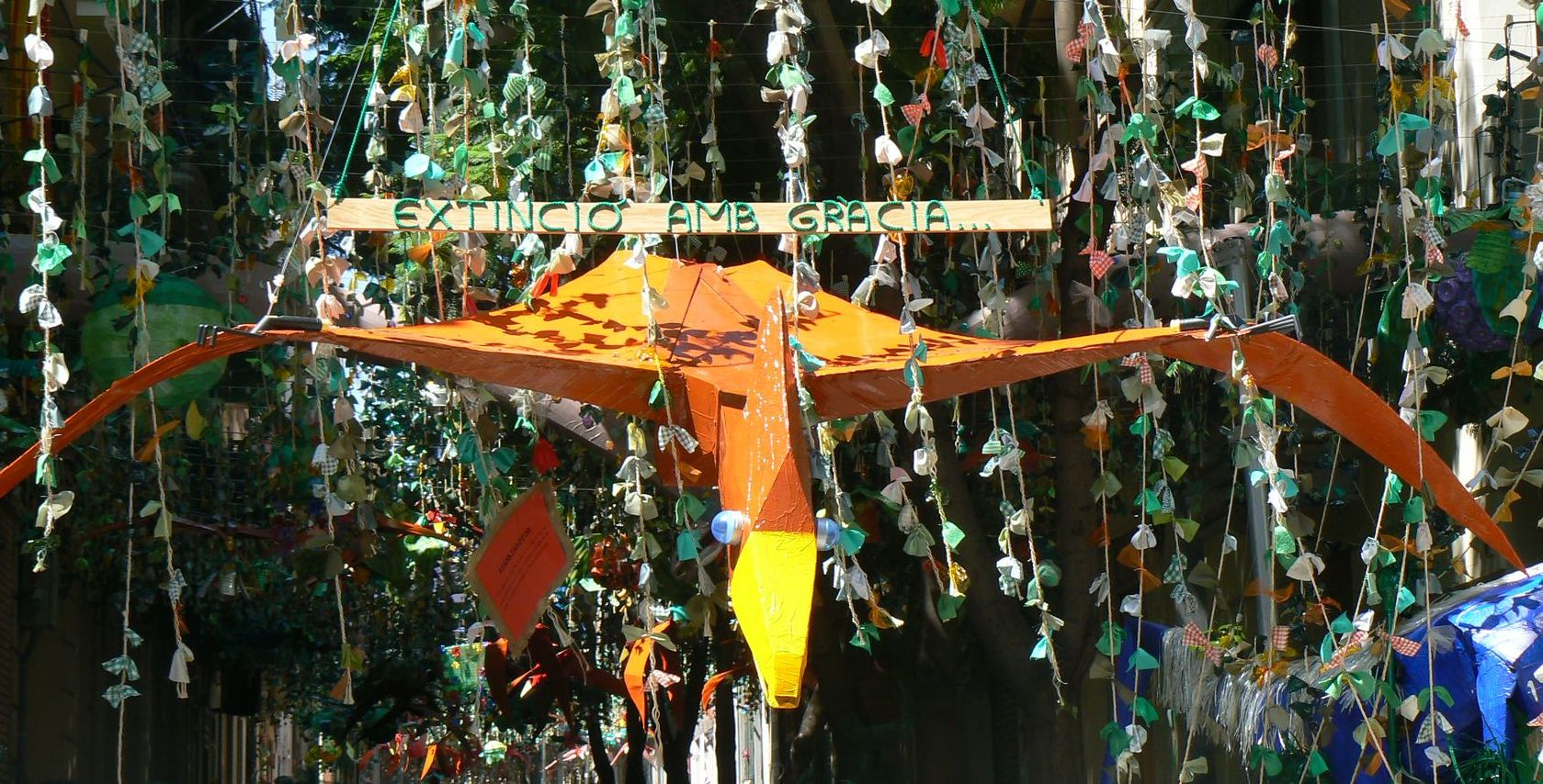 Detall de la decoració del carrer Joan Blanques de Baix, amb el tema "extinció amb Gràcia" amb motiu de les festes majors del barceloní barri de Gràcia de 2010.